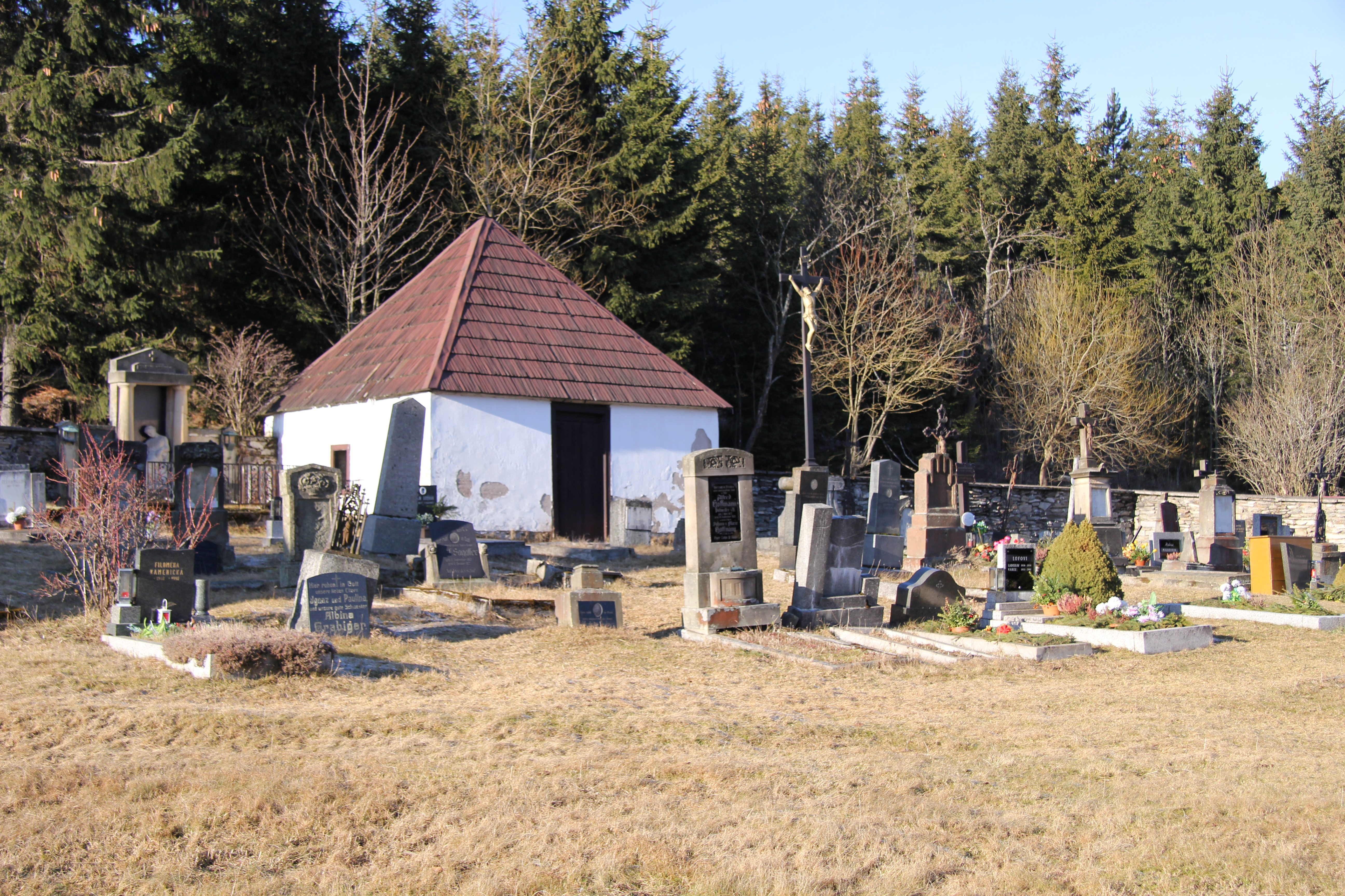 Hřbitov v Dolní Malé Úpě (2015)